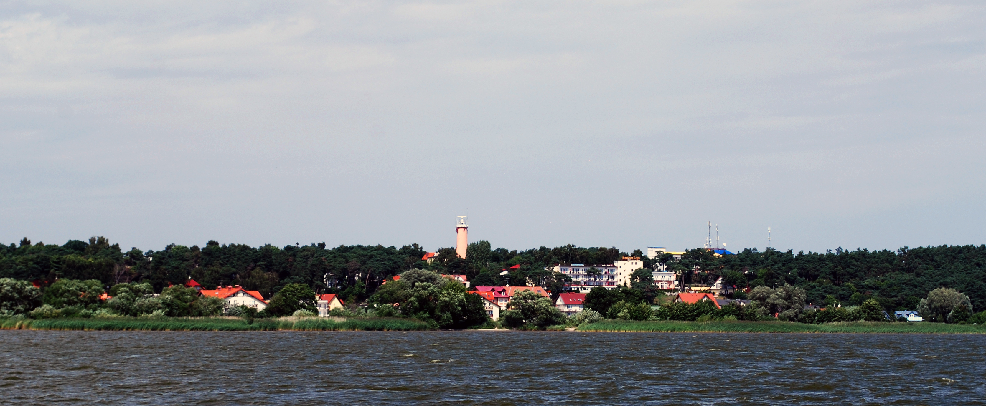 Panorama Krynicy Morskiej ze statku "Anita"